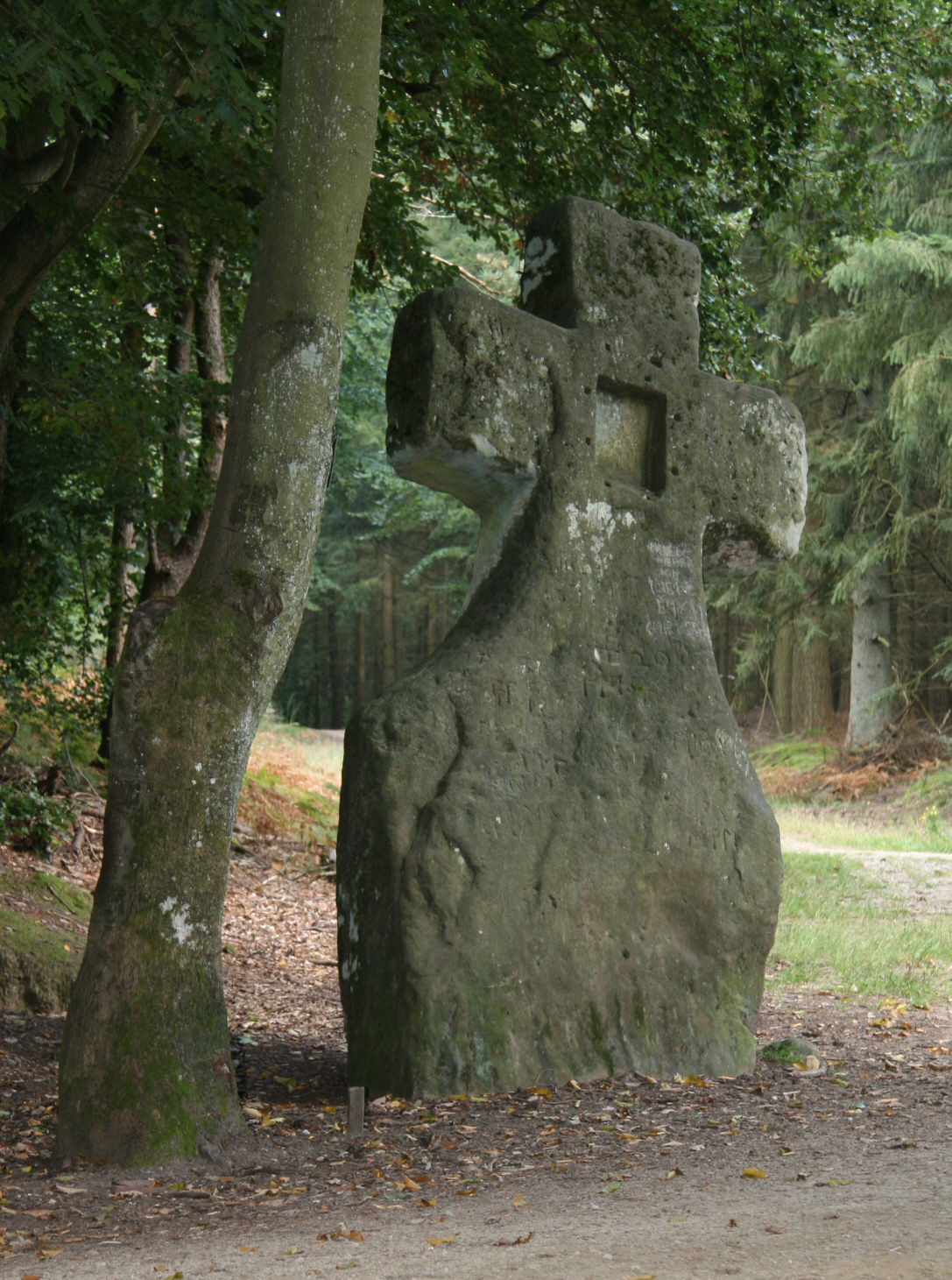 Fraubillenkreuz - christianisierter Menhir auf dem Ferschweiler Plateau in der Eifel